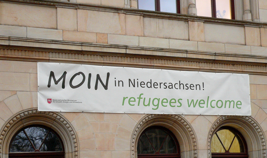 Transparent an der Fassade des Niedersächsischen Umweltministeriums in Hannover